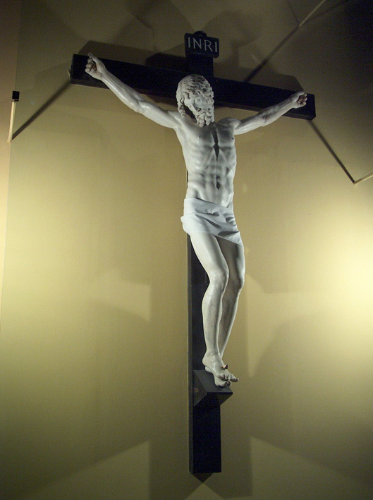 Basílica de El Escorial - Crucifijo de Benvenuto Cellini.